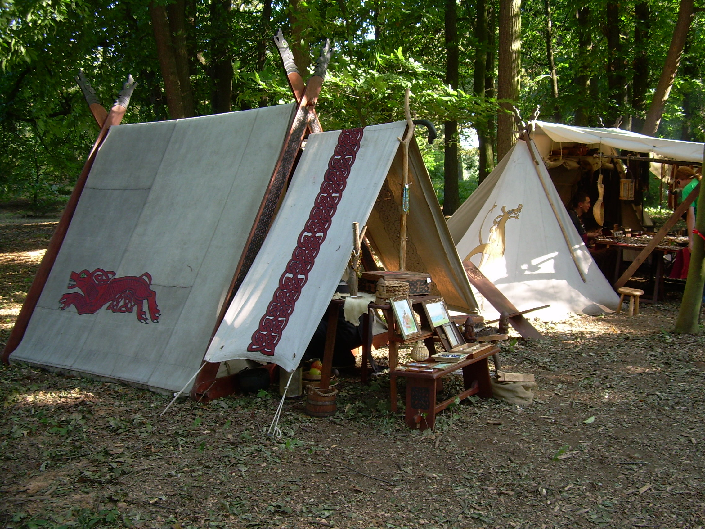 a vikingtent on a vikingmarket